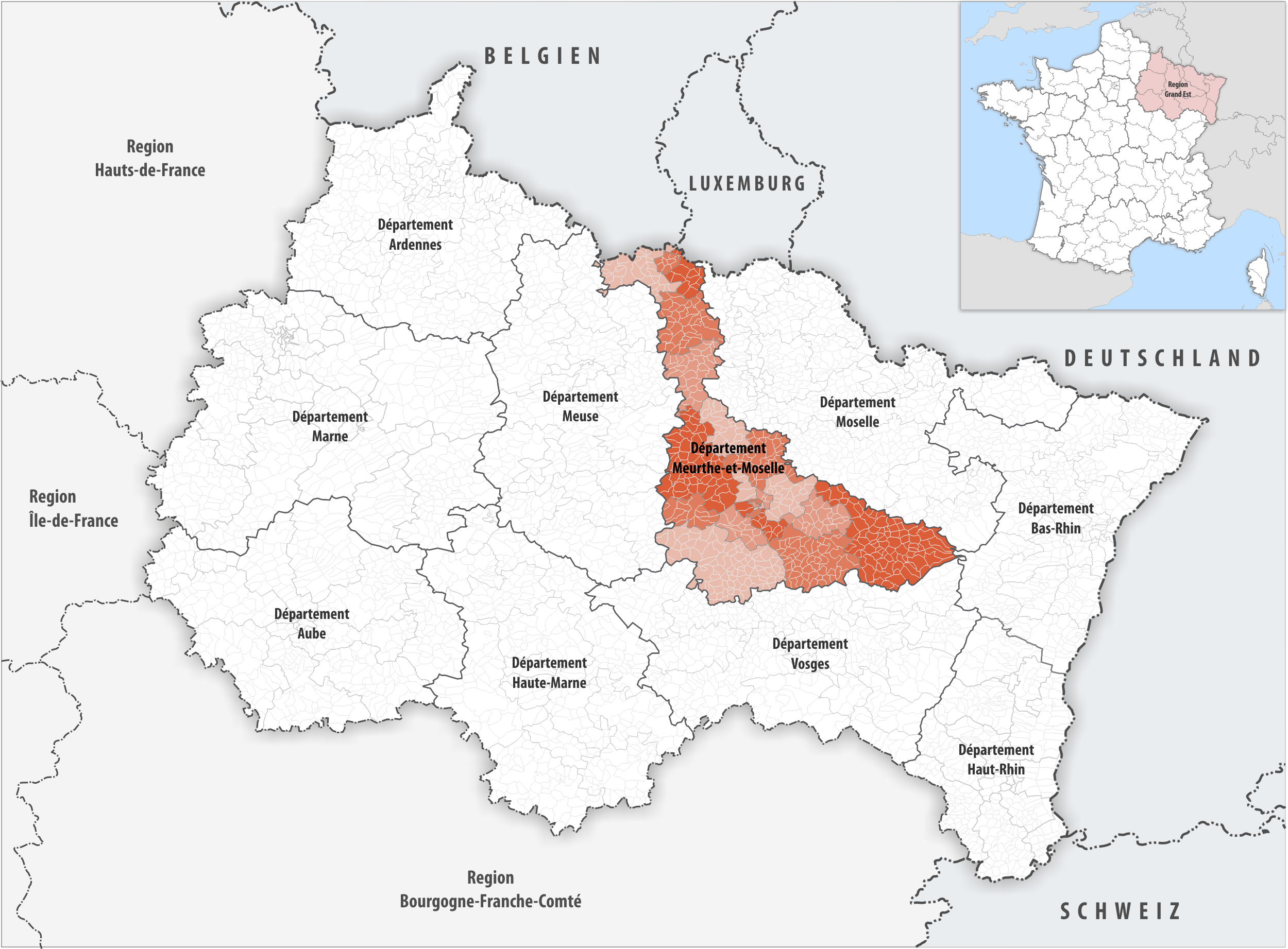 Lage des Departements Meurthe-et-Moselle